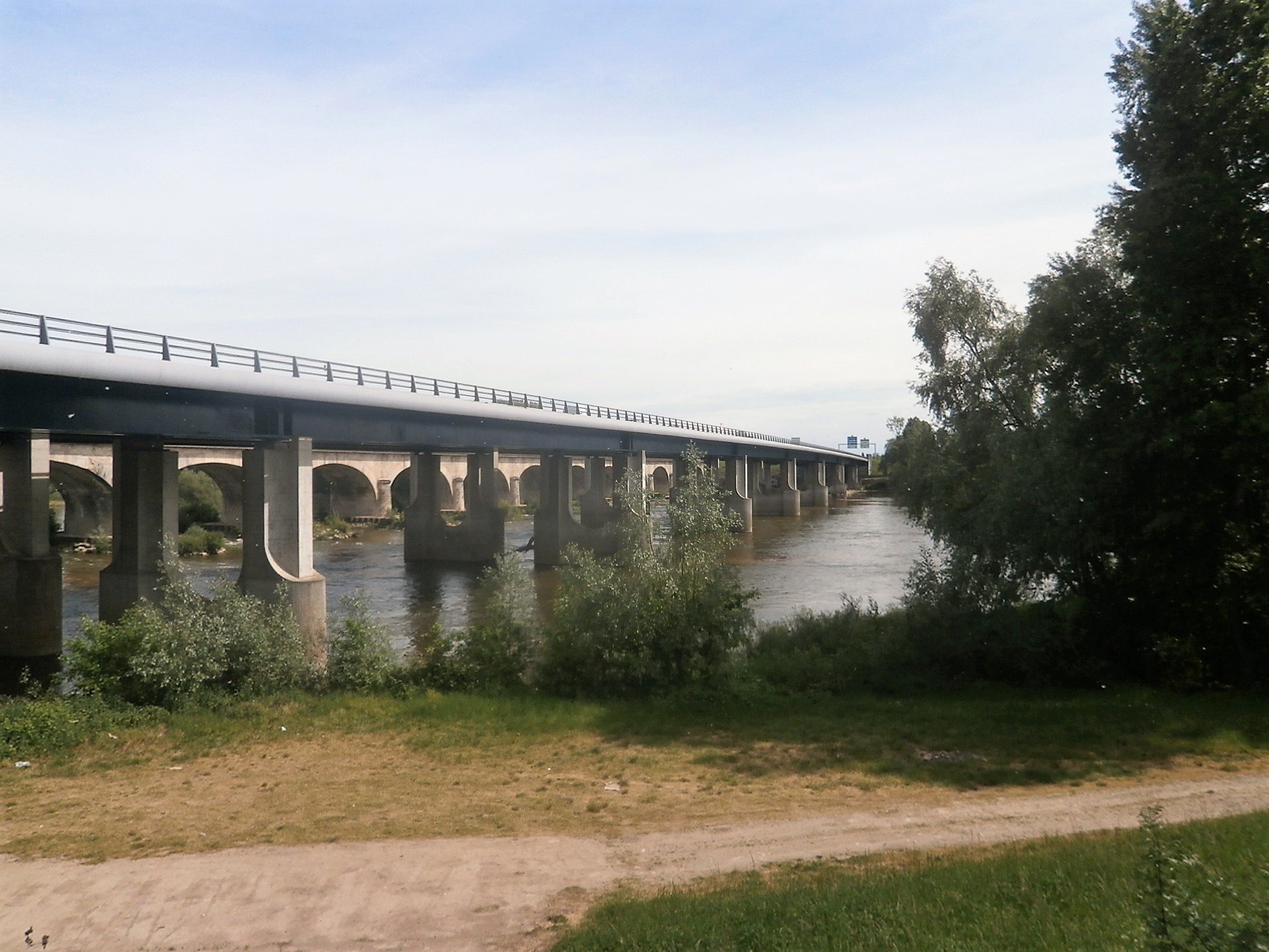 Le pont routier de Fondettes-Saint-Cyr